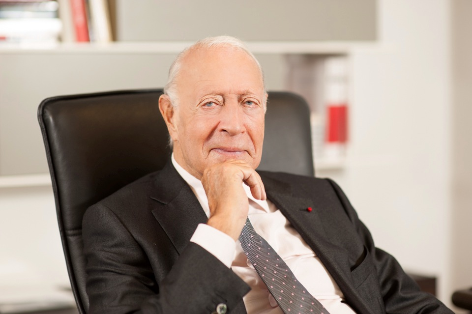 Portrait de Henry Hermand